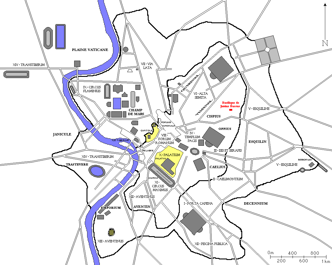 Plan de Rome redessiné à partir de diverses sources. Tous les bâtiments importants construits jusqu'à la fin de l'Empire romain sont dessinés, ainsi que les régions d'Auguste et les collines de Rome. Auteur : ColdEel En rouge, la Basilique de Junius Bassus.